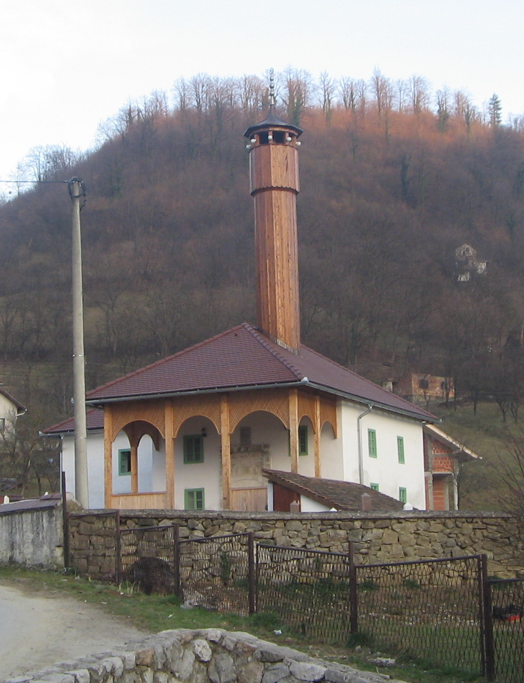 Behrem efendijina džamija